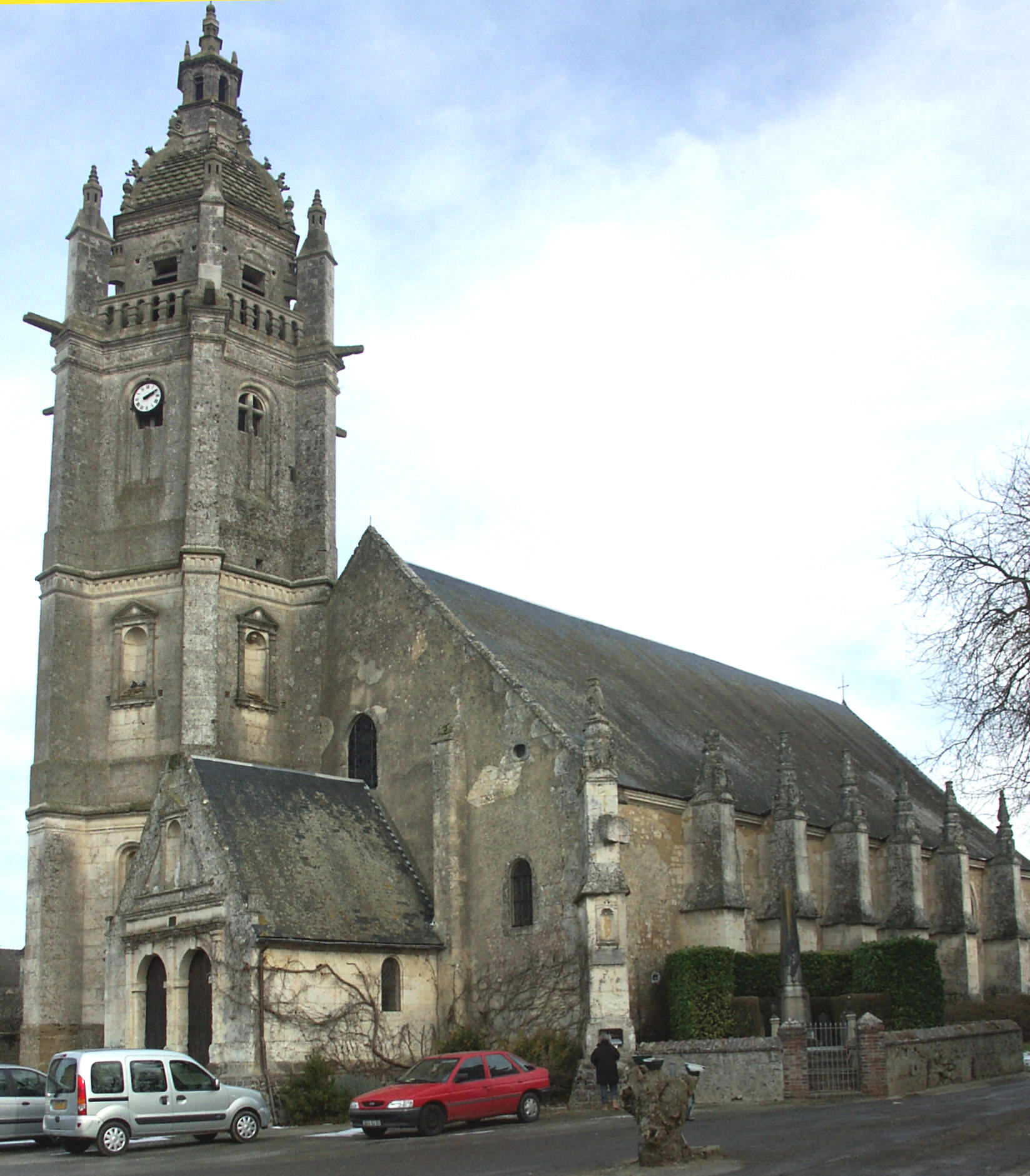 Eglise du 12e agrandie et transformée au 17e s.Vue du sud ouest.CMH 1909 et ISMH 1926